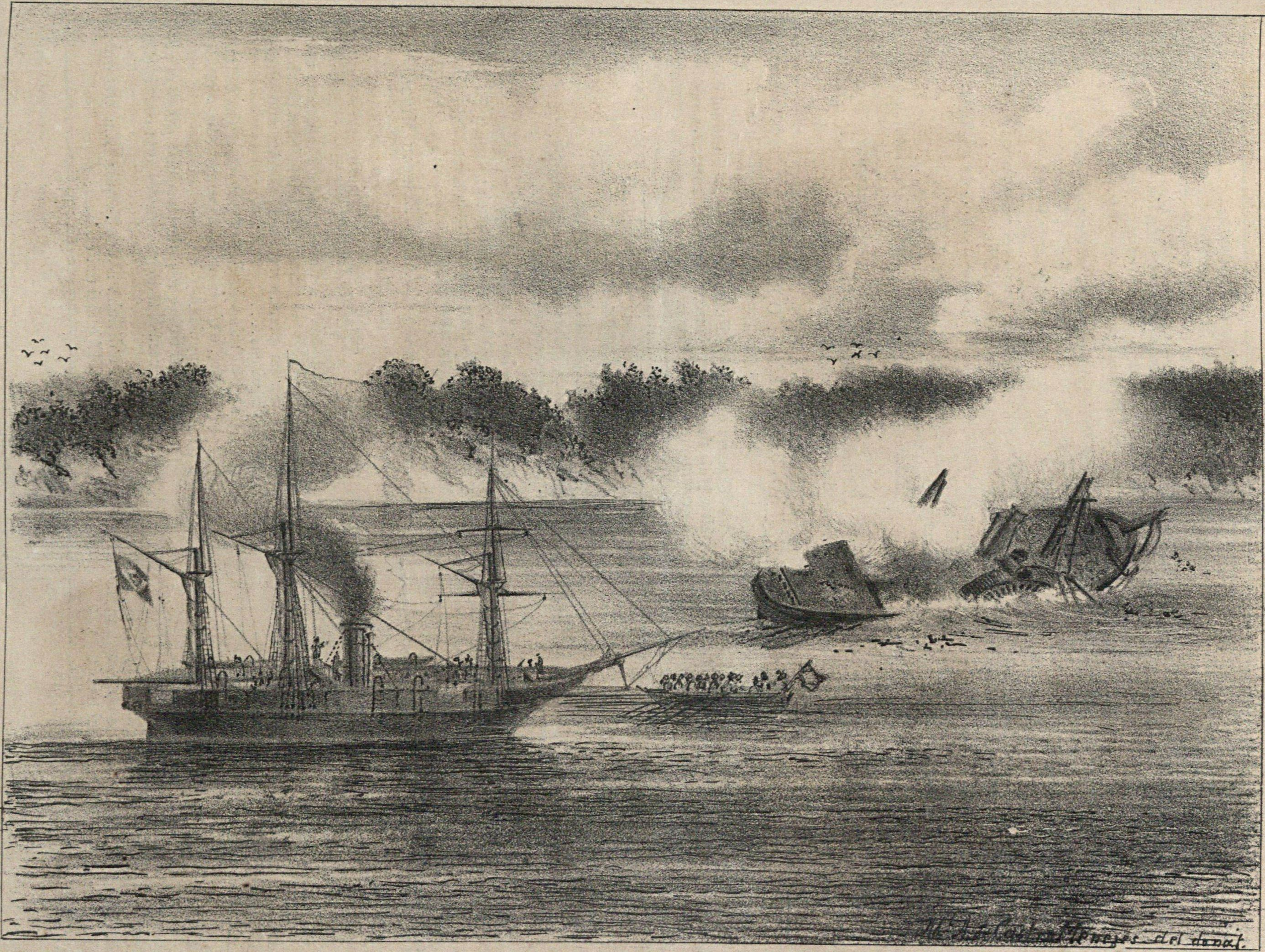 Episódios do dia 17 de junho de 1865. Combate Naval de Riachuelo. A canhoneira Araguary, comandada por Hoonholtz, incendiando o vapor Marquez de Olinda.